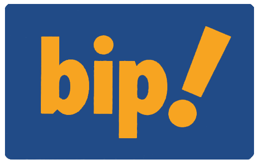 Un dibujo de la tarjeta bip!, que sólo muestra los colores y donde va la palabra, no posee ni las formas ni las tipografías de la tarjeta original